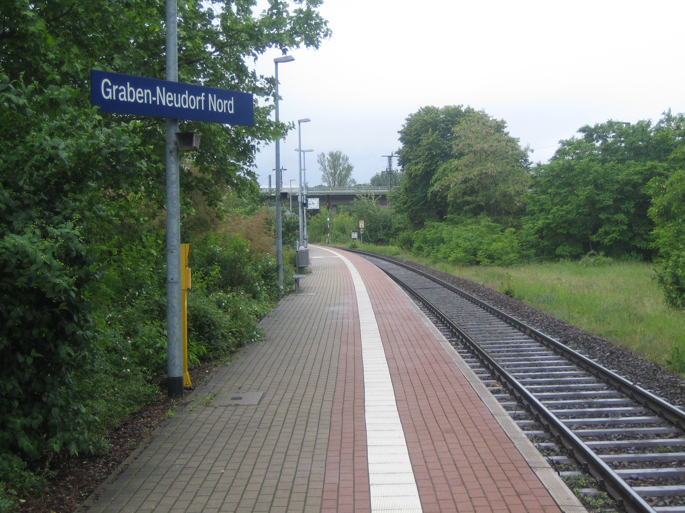 Haltepunkt "Graben-Neudorf Nord"